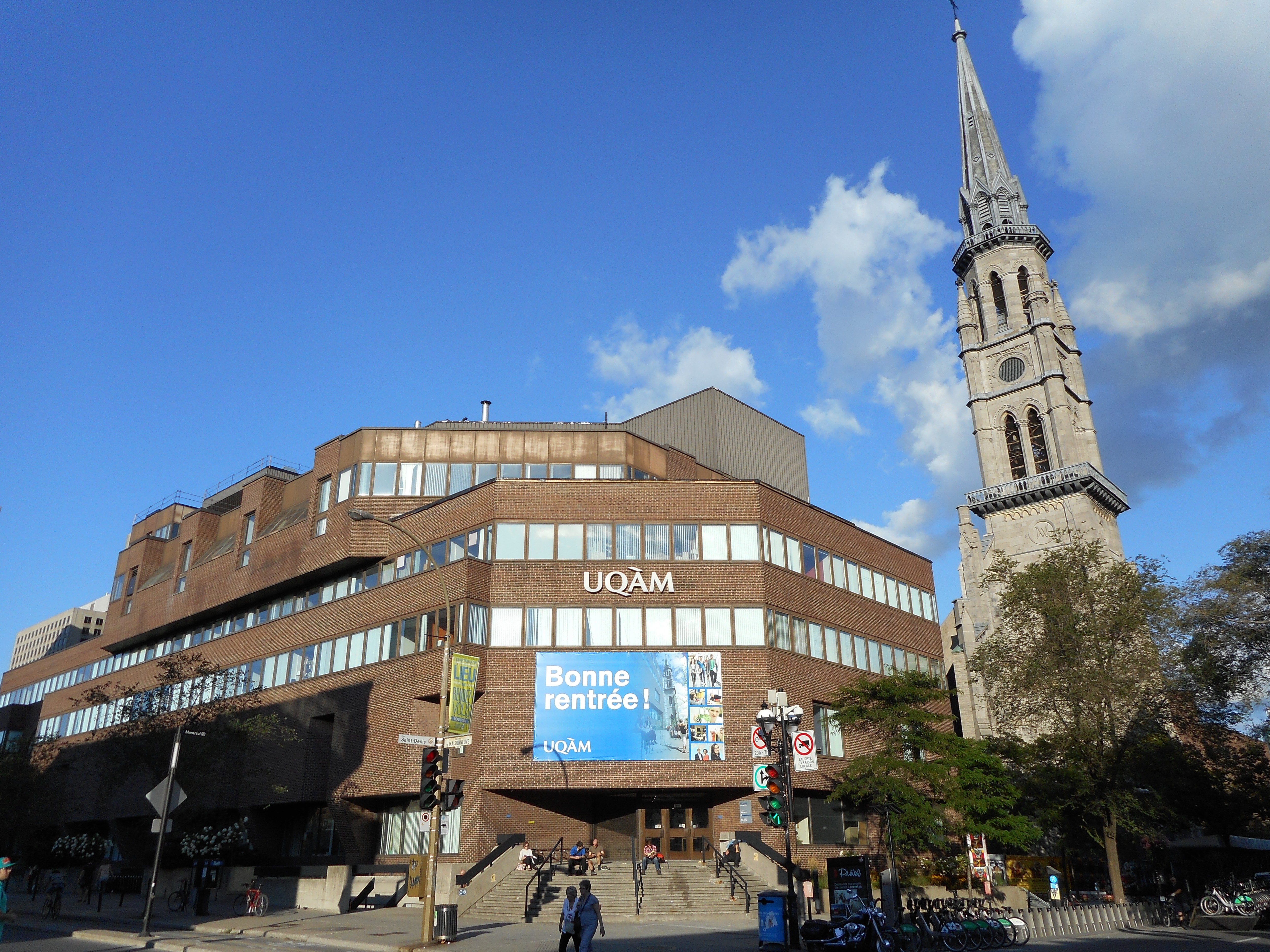 Pavillon Judith-Jasmin, Université du Québec à Montréal (UQAM). Le clocher était celui de l'église Saint-Jacques le Majeur.